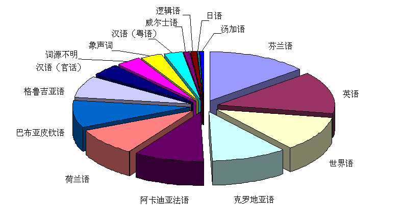 来源：根据 File:Tokipona vortdeveno.PNG 加工合成